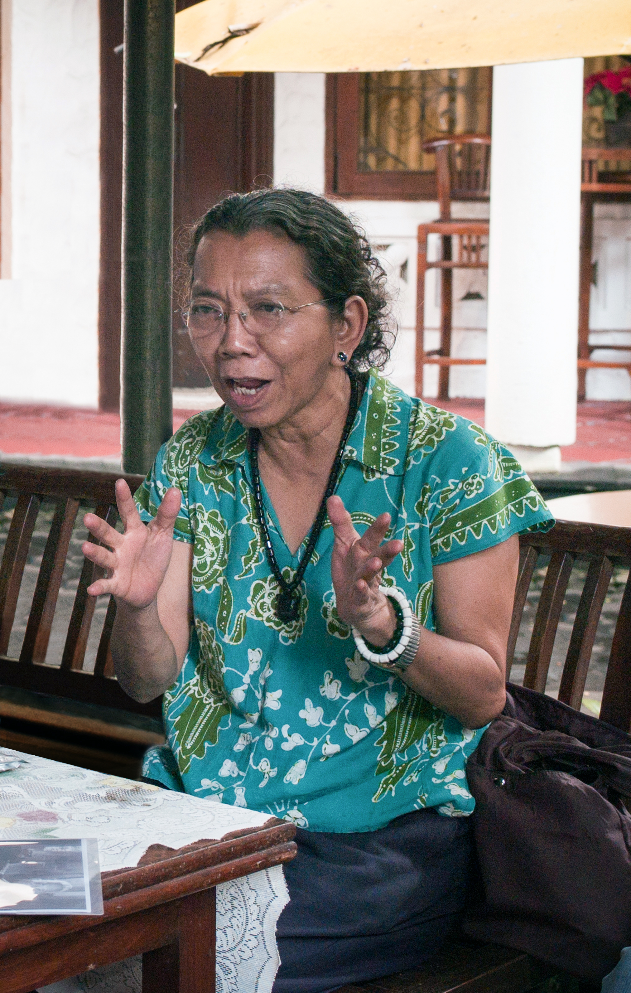 foto diri saat jumpa pers pameran visual Kitab Ianfu di Cemara 6 Gallery